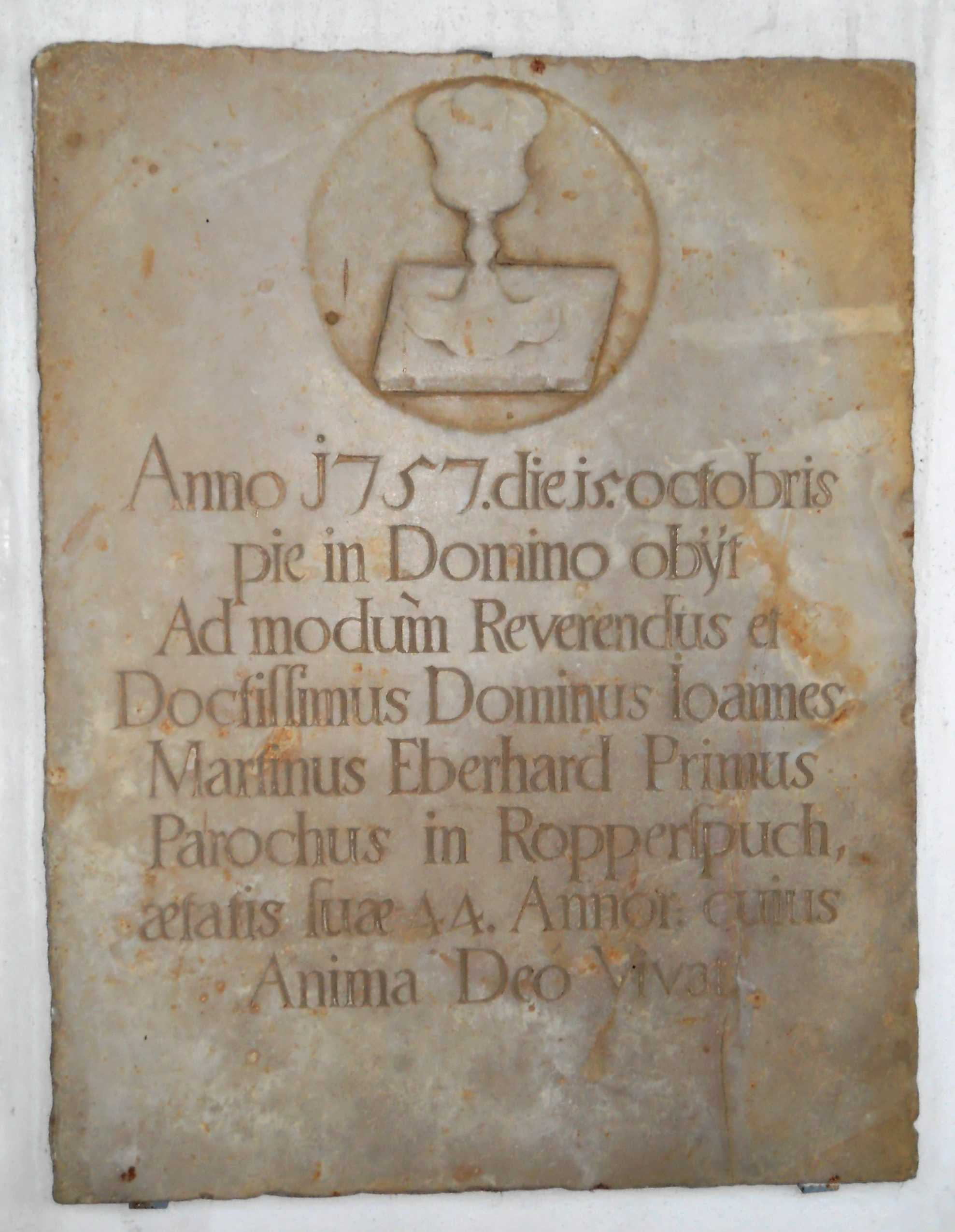 Gedenkstein an den ersten Pfarrer von Rupertsbuch, einem Gemeindeteil von Schernfeld im oberbayerischen Landkreis Eichstätt, in der Pfarrkirche von Rupertsbuch